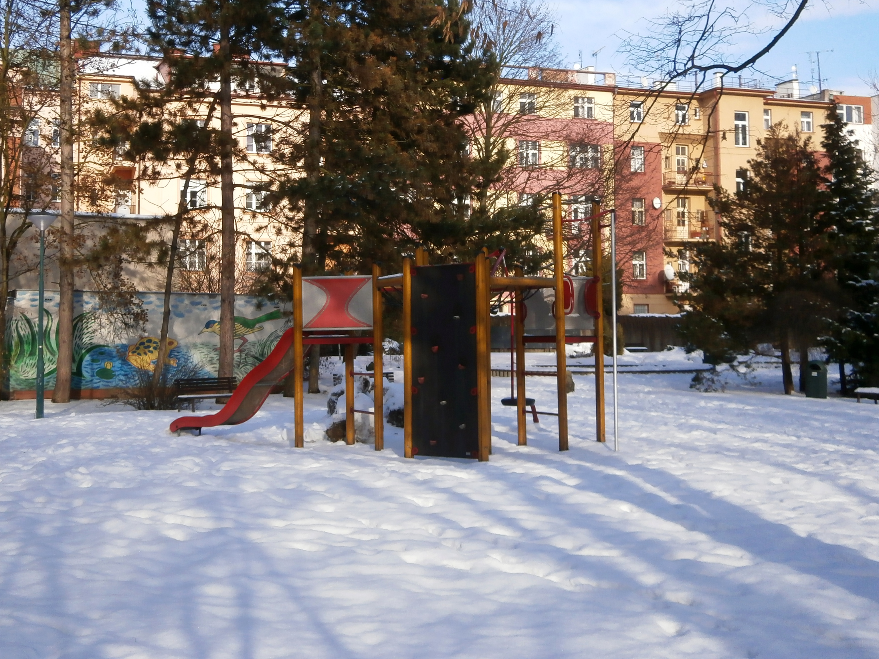 Parčík Pohádka (Hradec Králové)